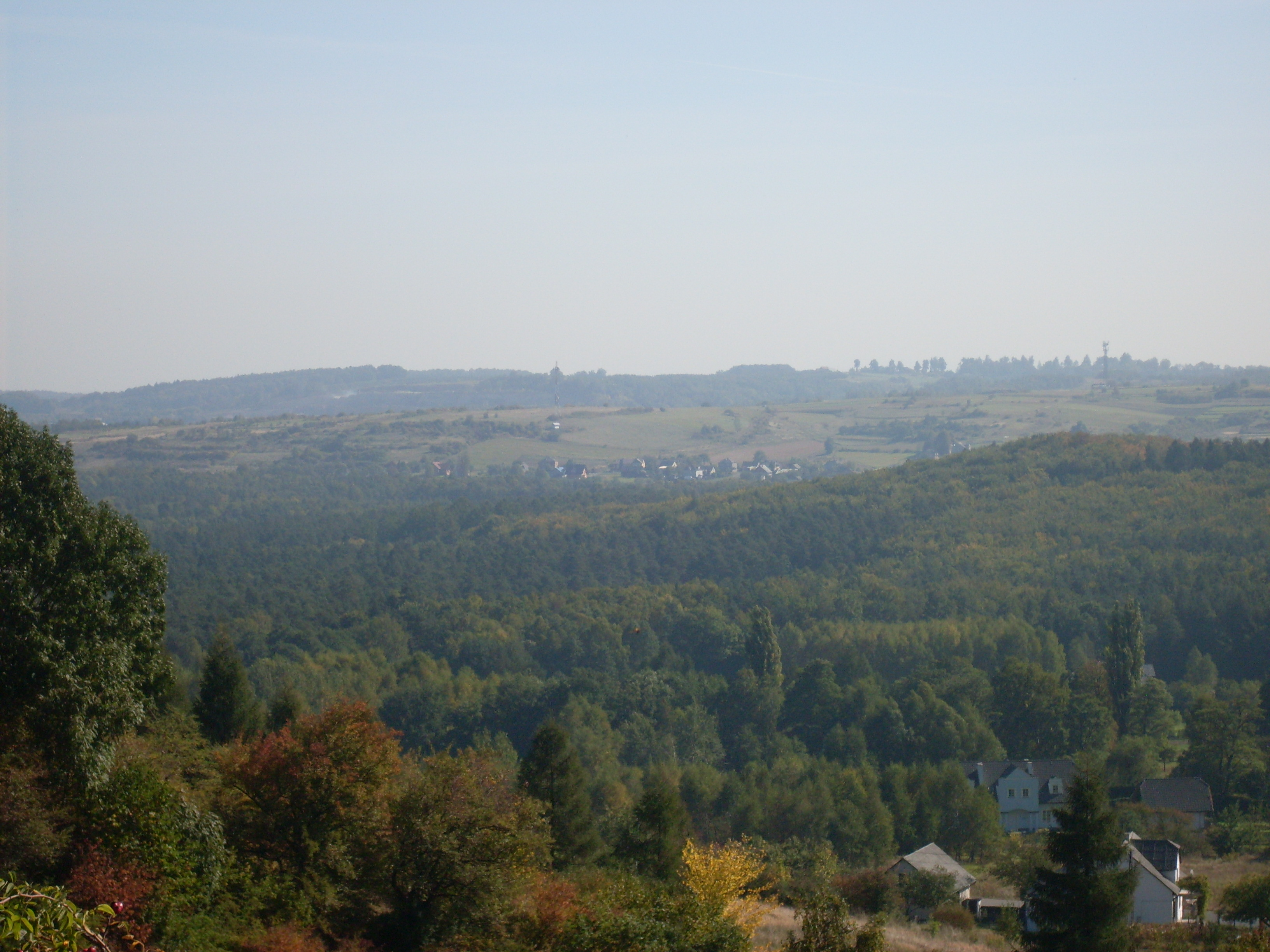 Rudno.Widok z Zamku Tenczyn na część Podzamcze